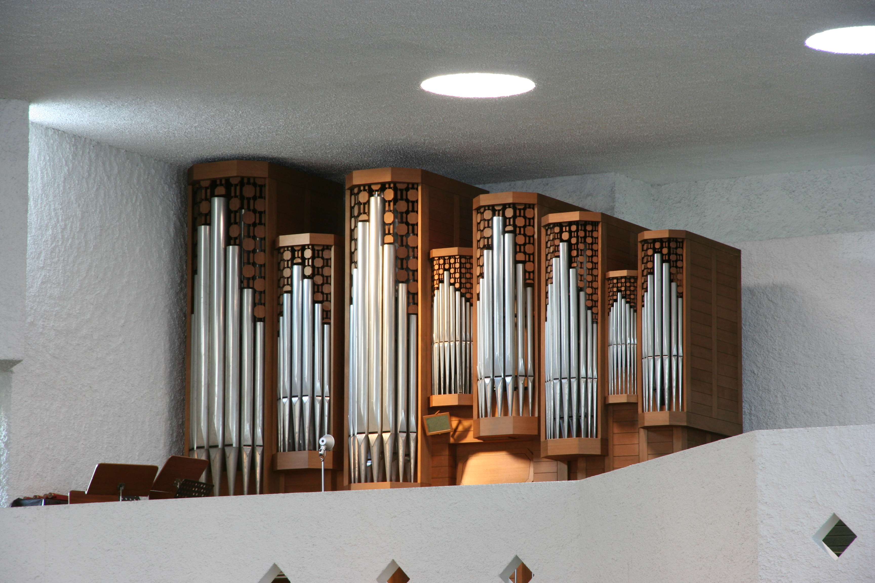 Römisch-katholische Kirche St. Peter und Paul Rotmonten